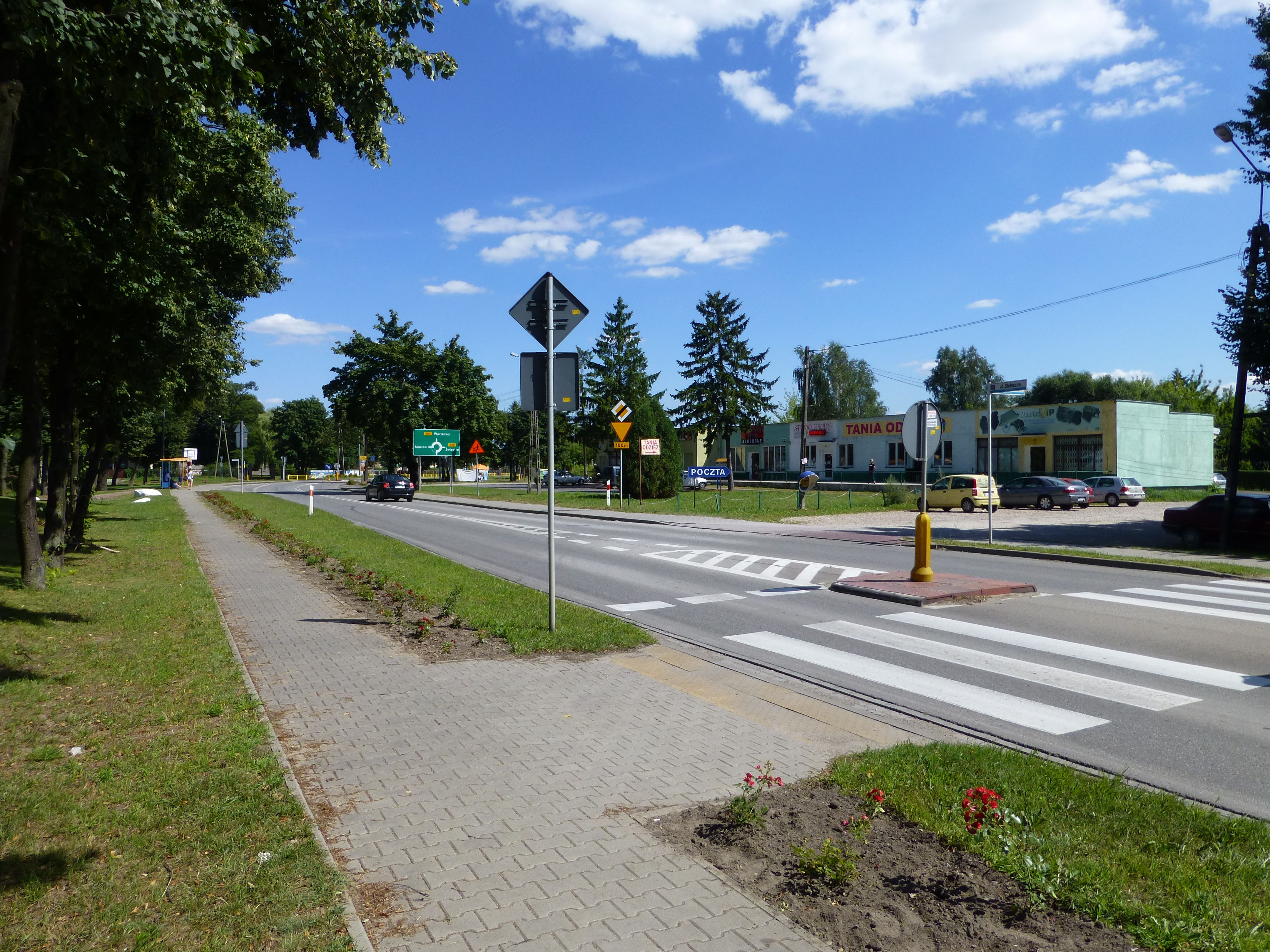 Centrum Zaborowa